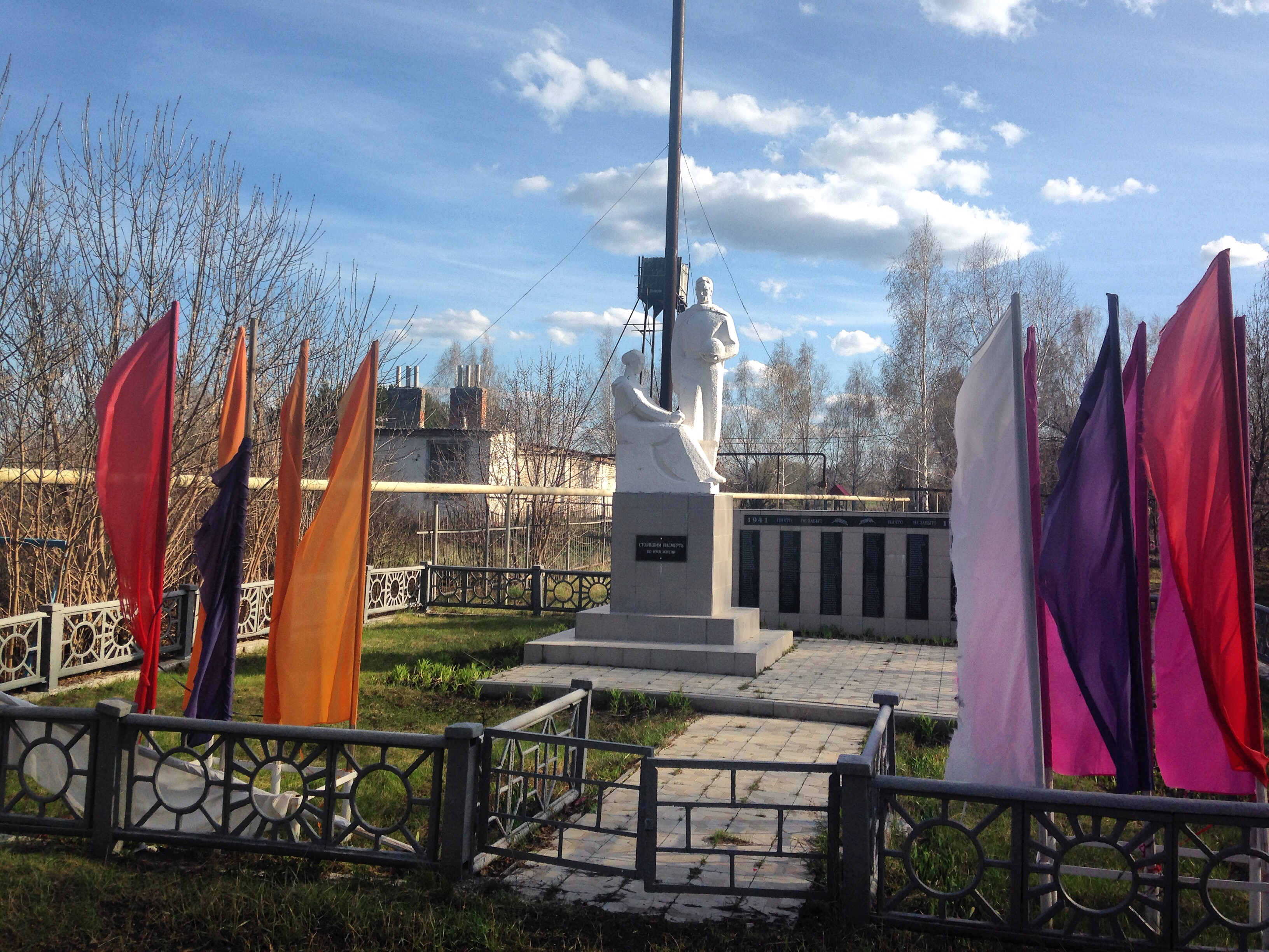 На фото изображён памятник и сквер посвященный победе в ВОВ